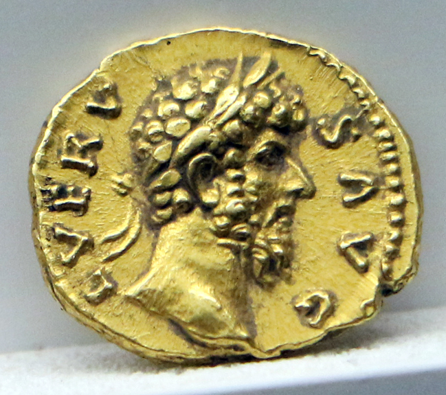 Museo Archeologico Nazionale di Aquileia This is a photo of a monument which is part of cultural heritage of Italy.